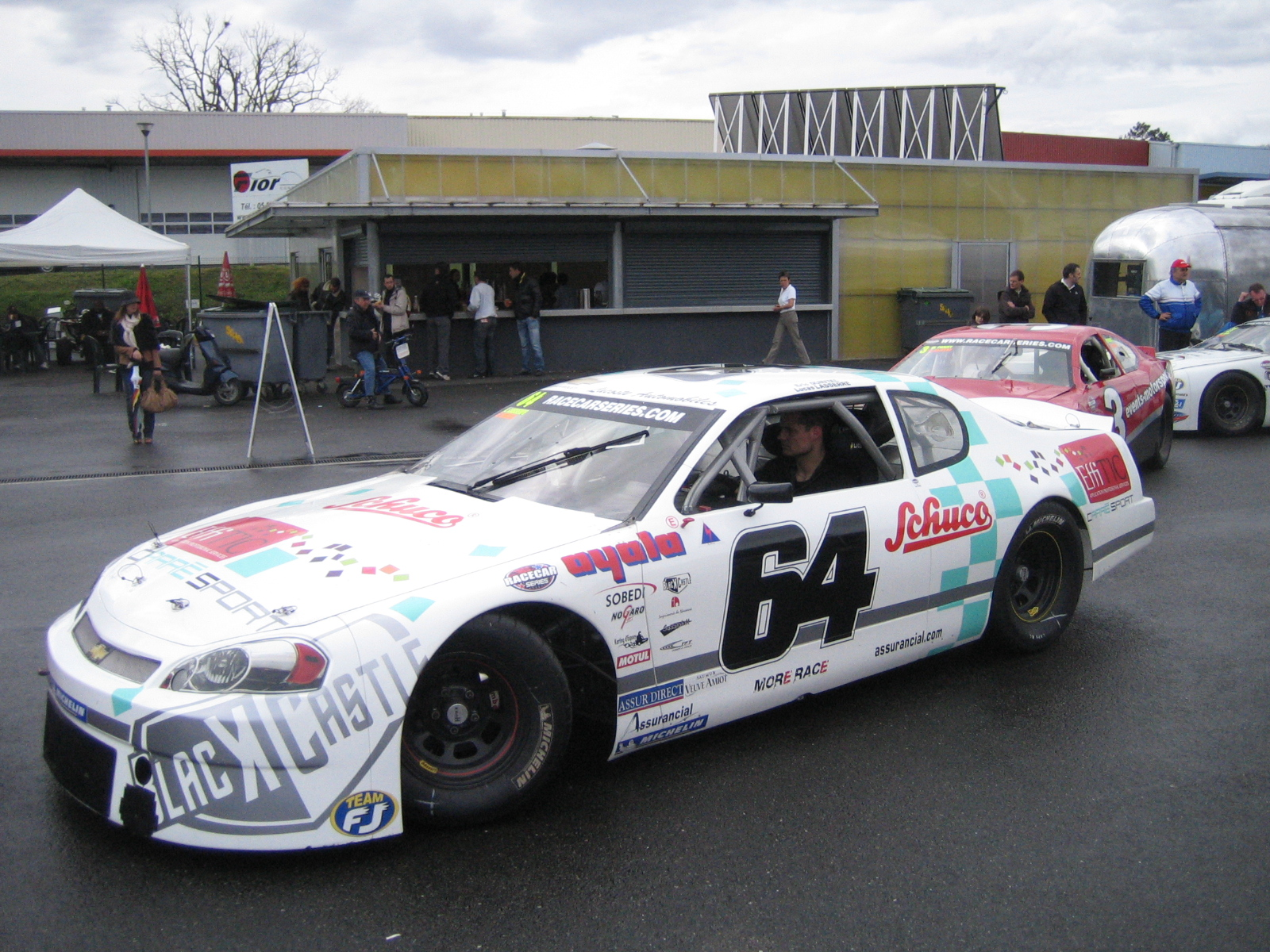 premiere course de la saison 2010 de la racecar serie à nogaro